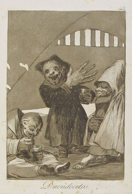 Capricho nº 49: Duendecitos de Goya, serie Los Caprichos